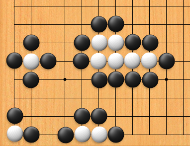 Ett par situationer inom brädspelet Go: samtliga vita stenar är fångade och skall avlägsnas från brädet.